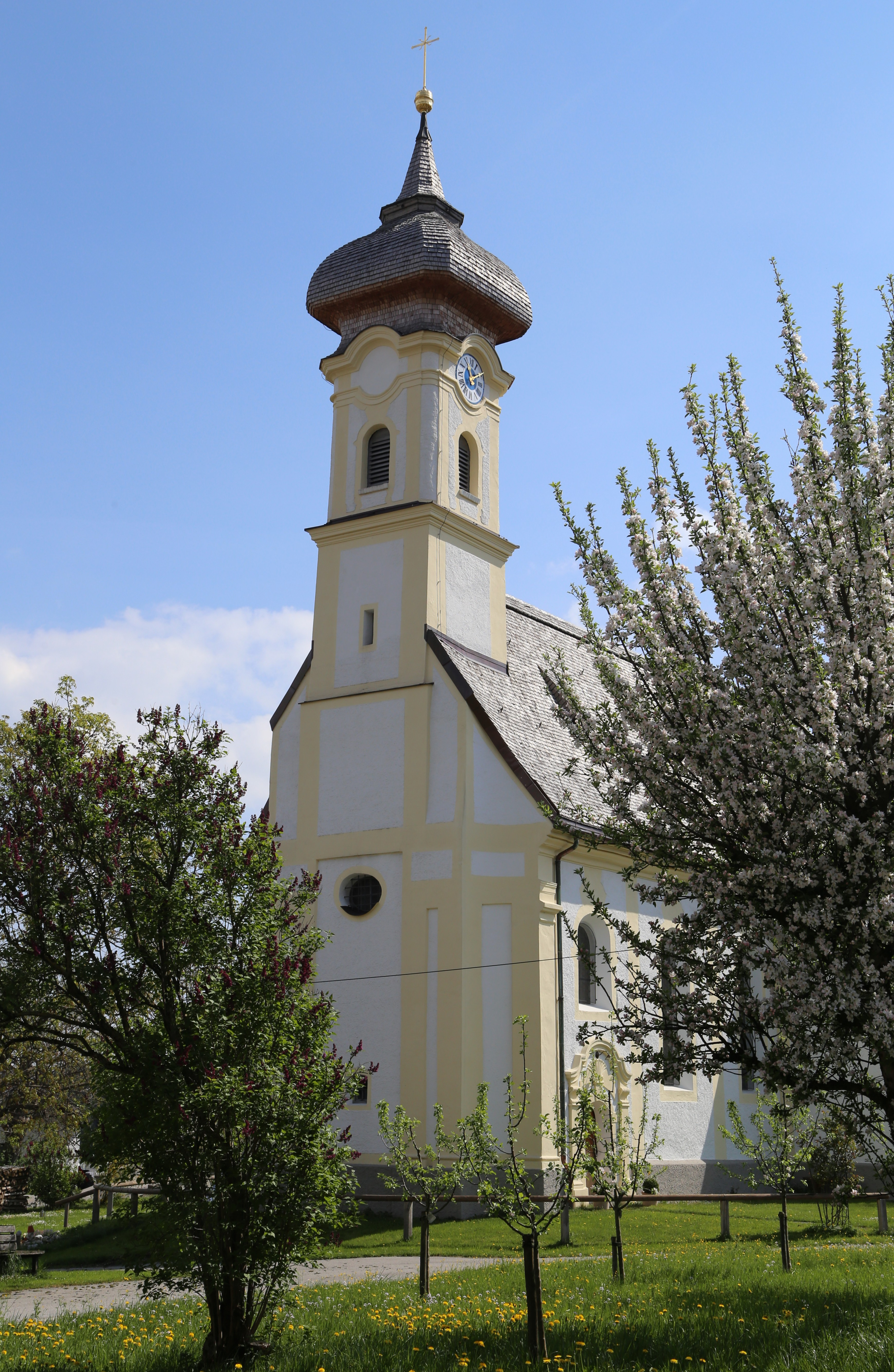 Laurenziweg 6, Bad Feilnbach; Kath. Filialkirche St. Laurentius und Sixtus, Saalbau mit westlichem Dachreiterturm mit Kuppelhaube, im Kern spätgotisch, barocker Ausbau durch Johann Thaler, 1754-58; mit Ausstattung.